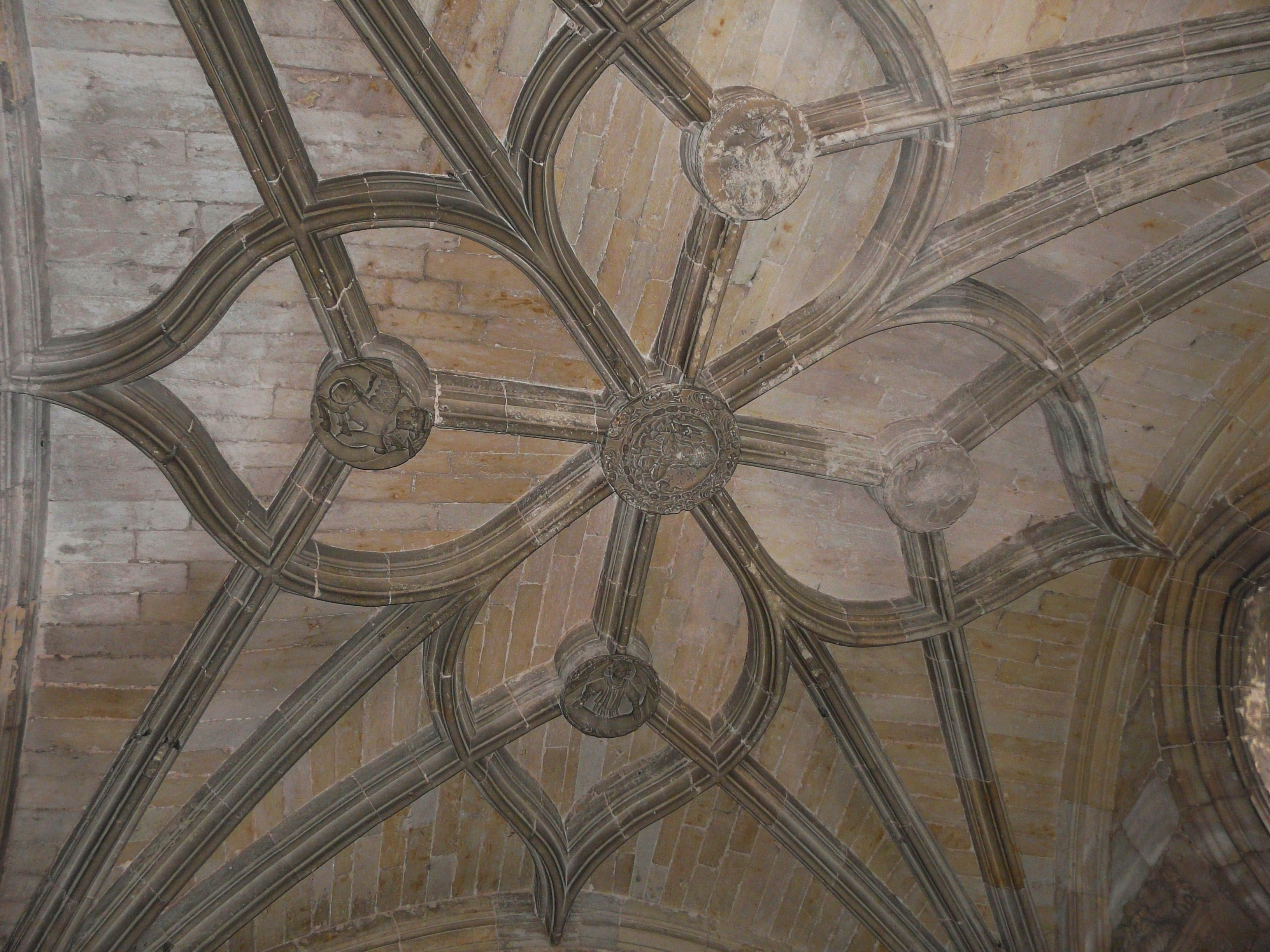 Le plafond du rez-de-chaussée de la chapelle Saint-Jean-Baptiste, Périgueux, Dordogne, France.